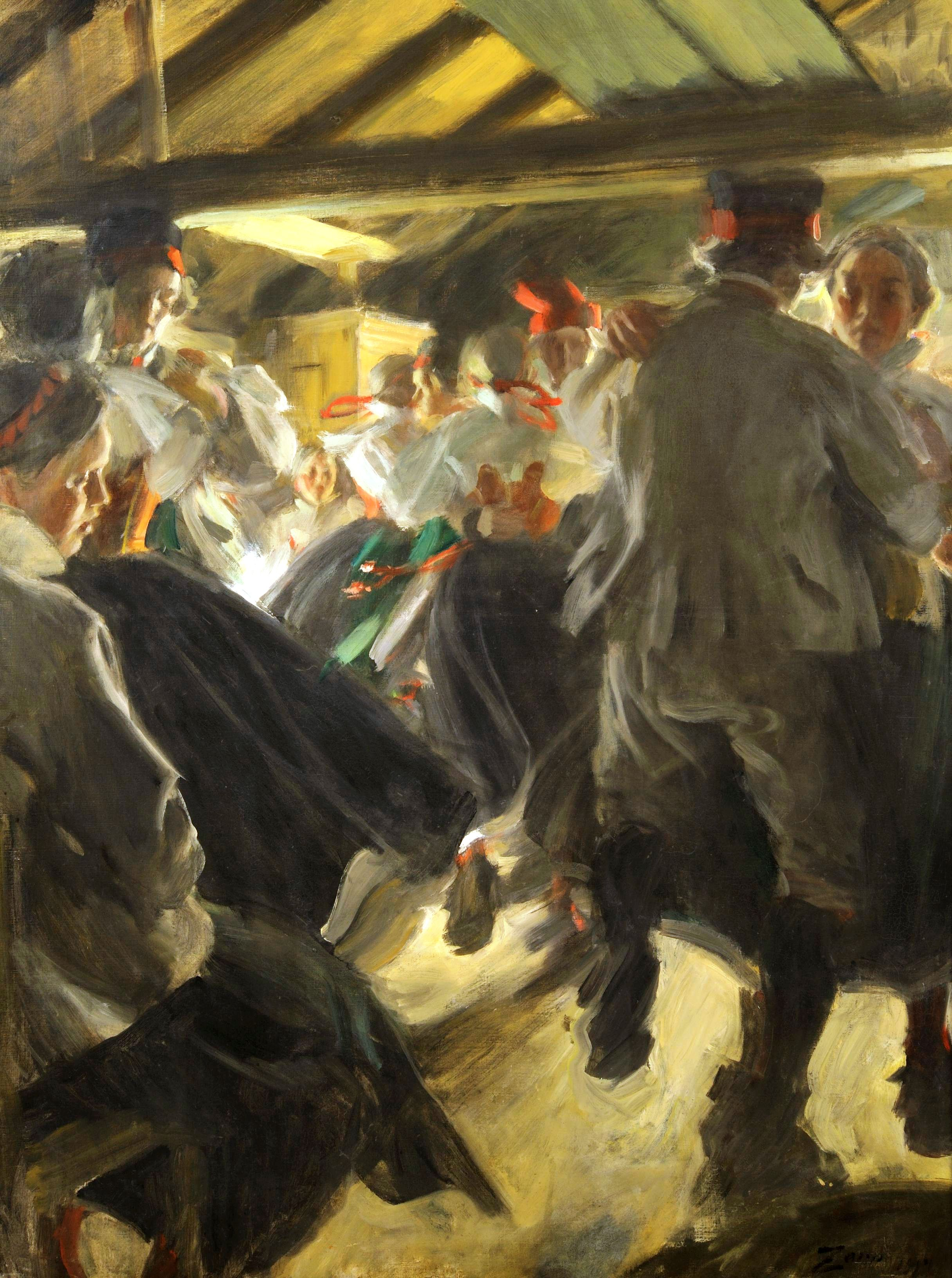 Tanz in der Gopsmorkatelabel QS:Lde,"Tanz in der Gopsmorkate"